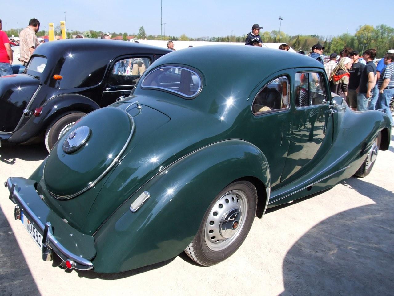 Quelle: selbst fotografiert, 04/2007 Fotograf: Späth Chr.